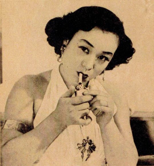 読売新聞社『家庭よみうり』319号（1952年）より黒木曜子